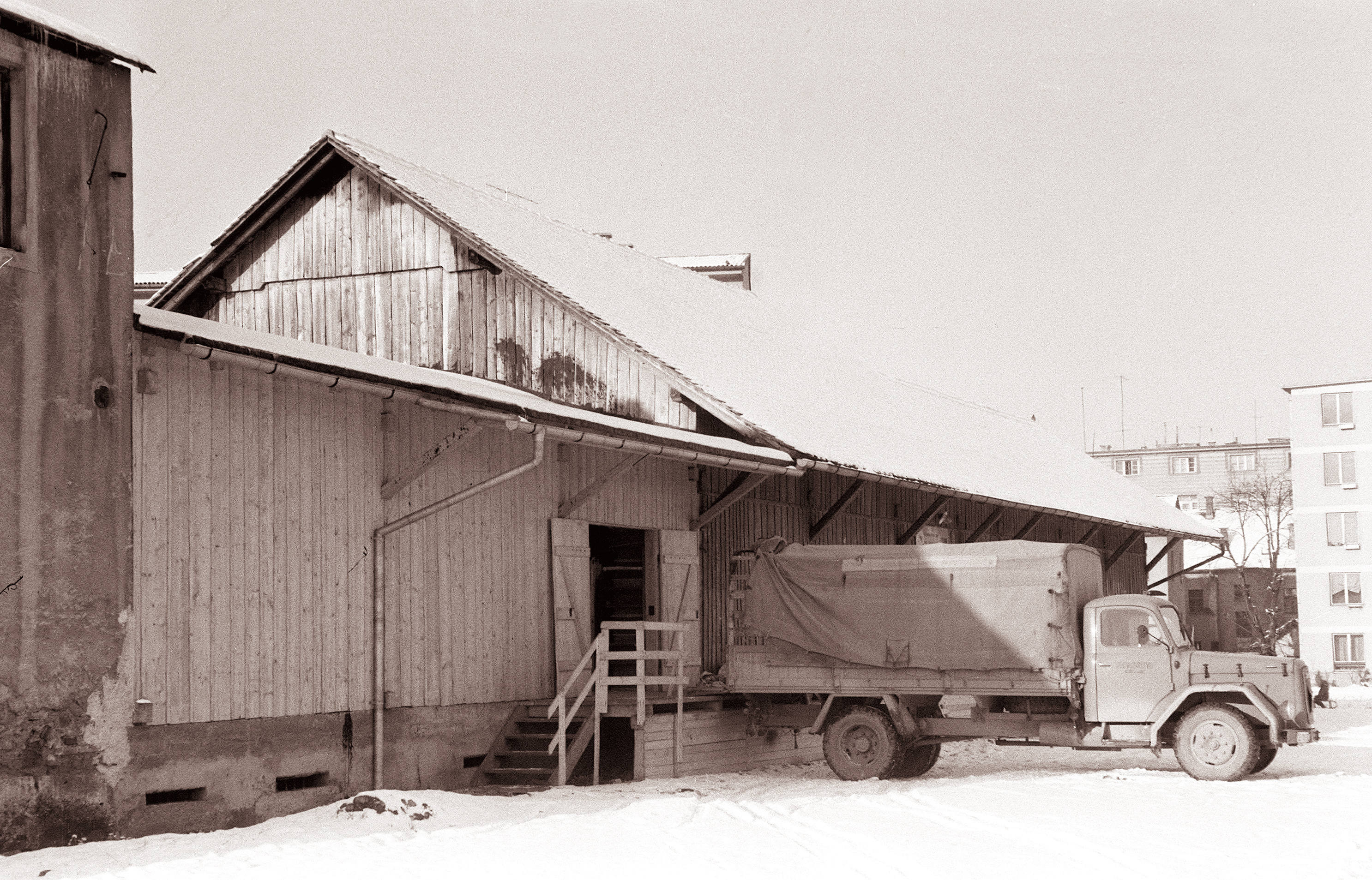 Leseno skladišče Slovenijalesa v Ulici XlV. divizije